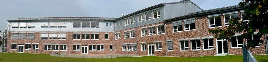 Anbau des Vinctent-Lübeck-Gymnasiums Stade